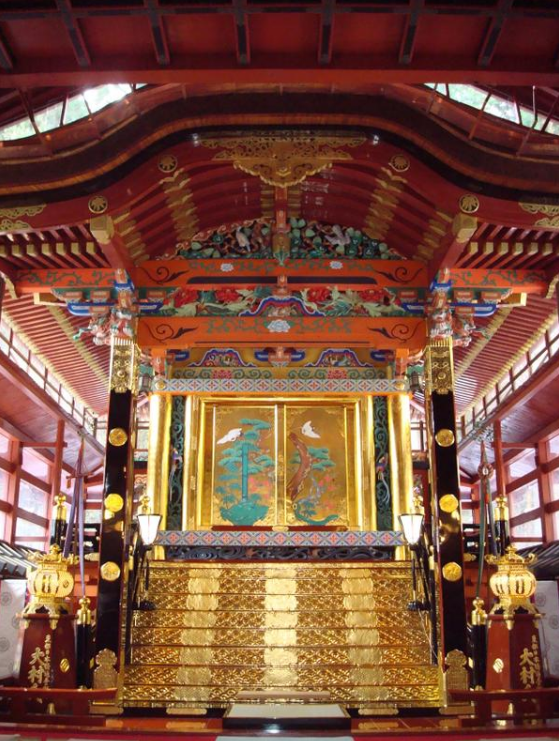 北口本宮富士浅間神社本殿 拝殿から拝観